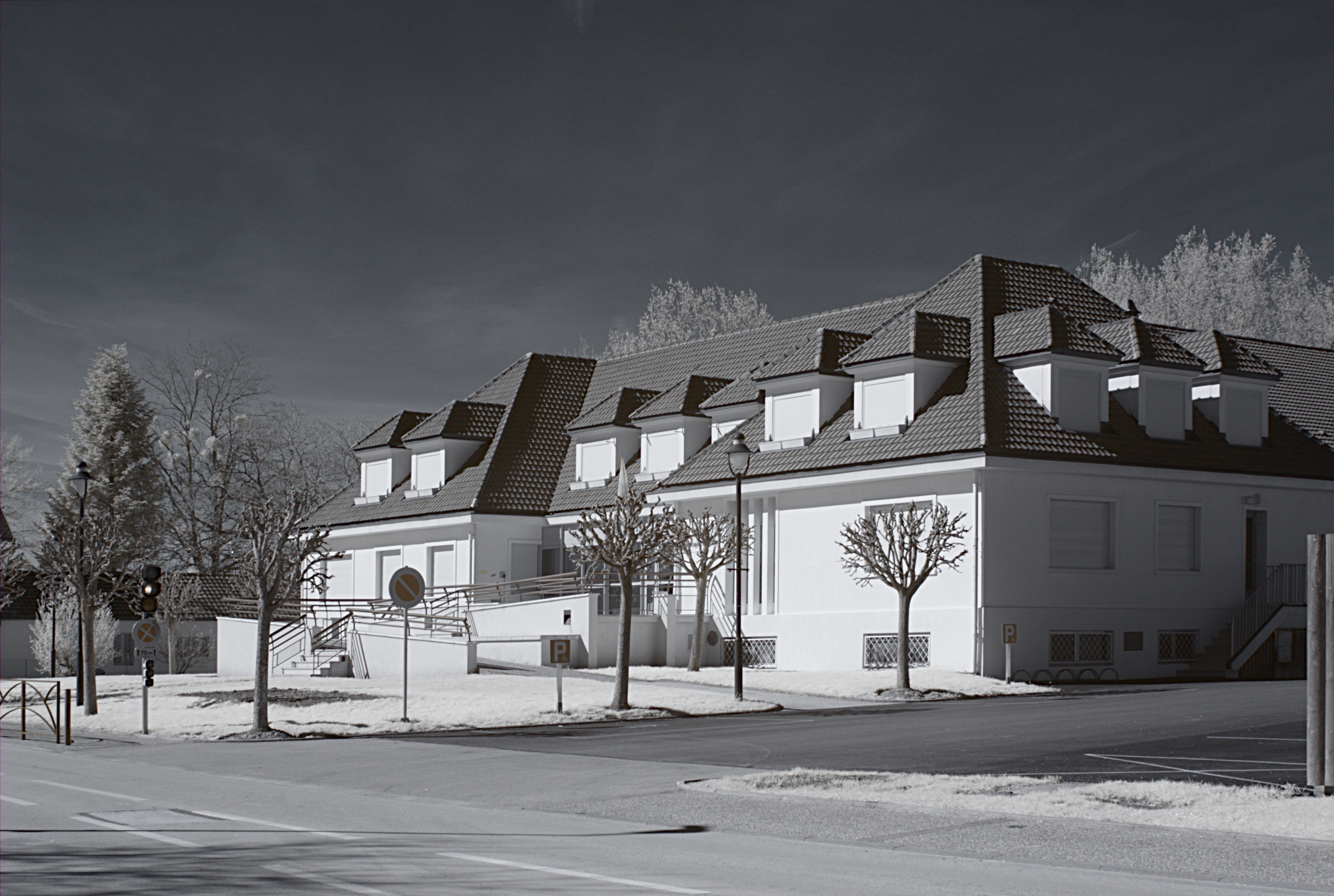 Mairie, Abergement-la-Ronce (Jura, Franche-Comté, France) photographié avec un filtre infrarouge 720 nm.